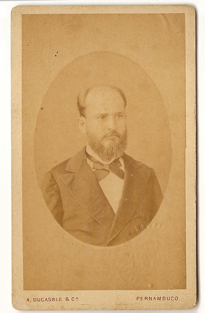 Joaquim José de Oliveira Andrade: bacharel em 1858, presidente de Pernambuco.